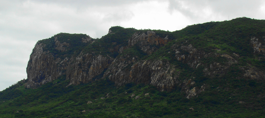 Reserva Biológica de Serra Talhada, Alagoas.